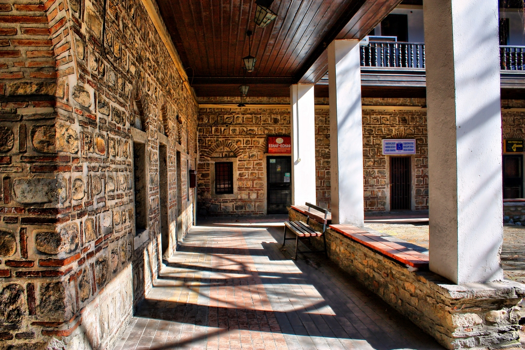 Kapan An. Skopje, Macedonia